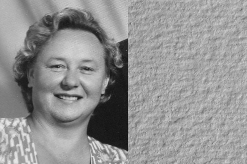 Куис, Ольга Ивановна